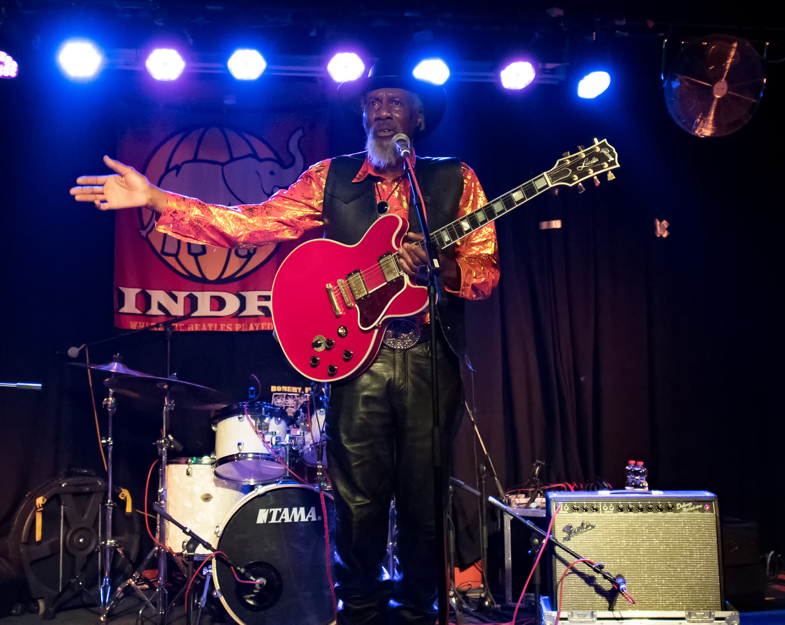 Robert Finley im Indra Club 64 2018